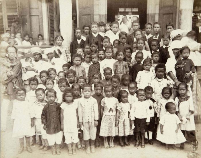 Foto. Portret van een groep kinderen van gemengde Chinese en Creoolse afkomst